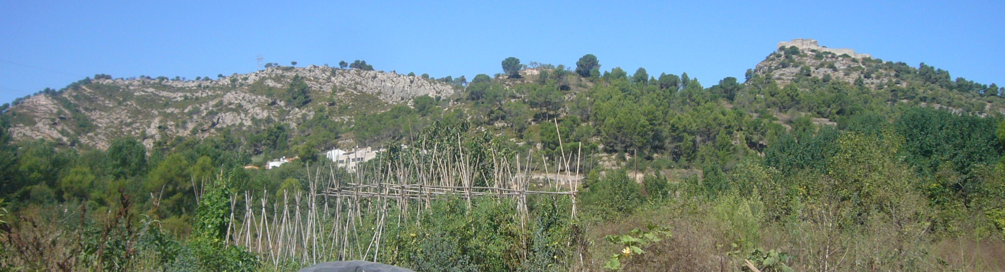 A l'esquerra, la Serra de la Ninota. Al centre, muntanya on hi havia l'ermita de Sant Andreu. A la dreta, la muntanya del castell de Claramunt. Vist des dels horts de Can Solà, a La Pobla de Claramunt, Anoia.